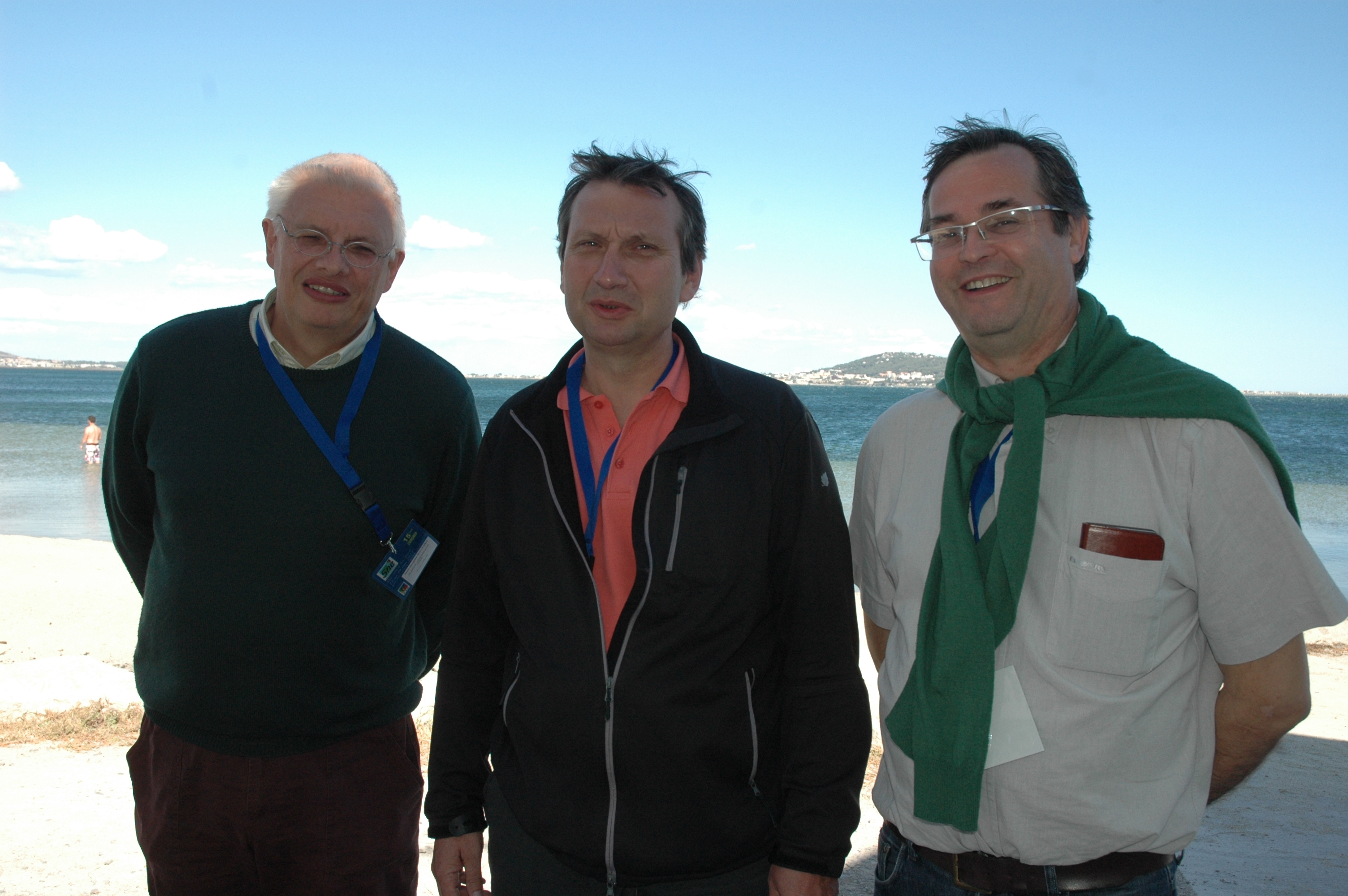 Jean-Jacques Meynard, Daniel Gascard, Jean-Luc Ciulkiewicz, anciens et actuel secrétaires généraux du SNE au congrès de Mèze de mai 2014